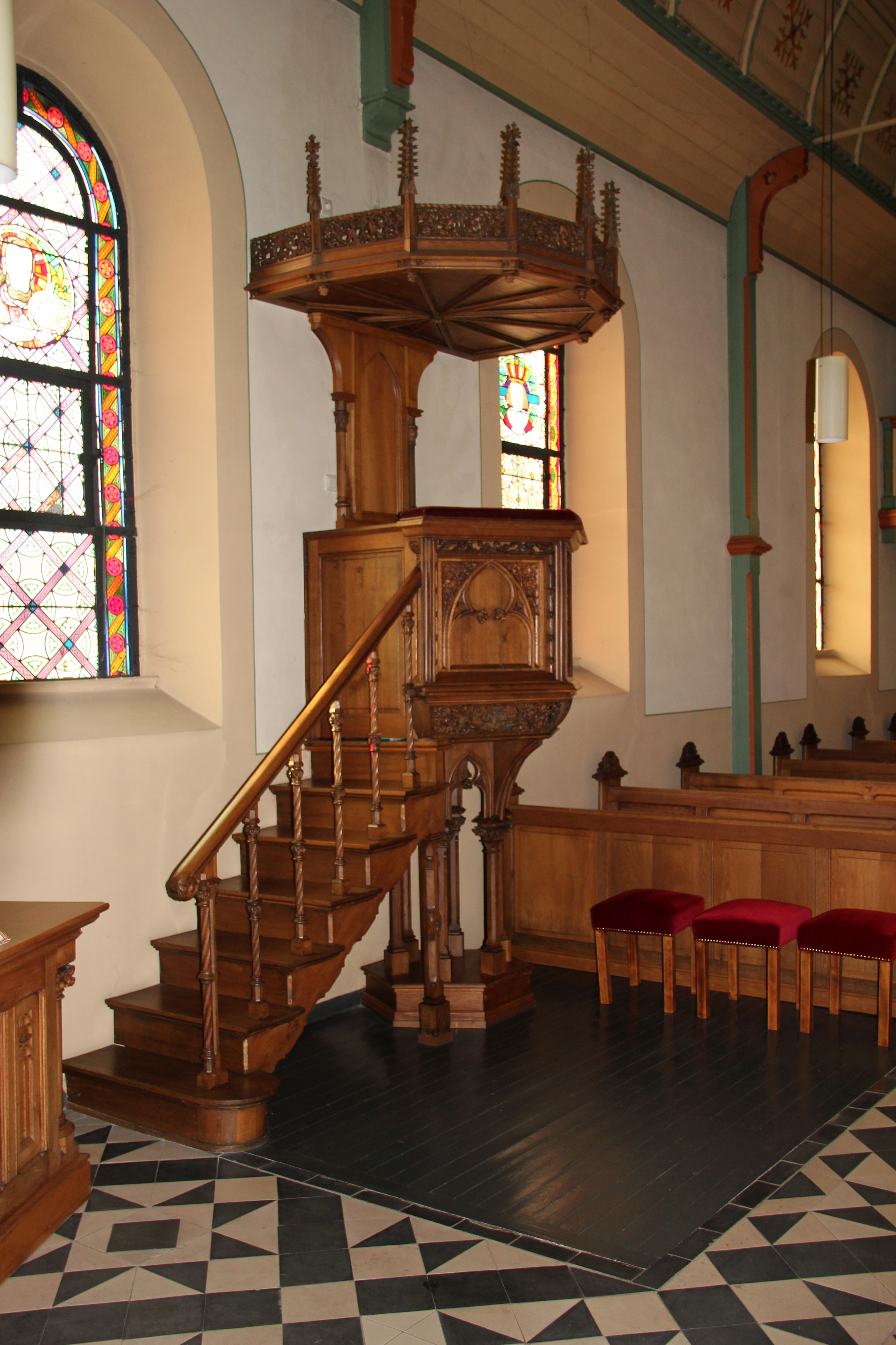 Marienkapelle Frauenthal, Innenausstattung